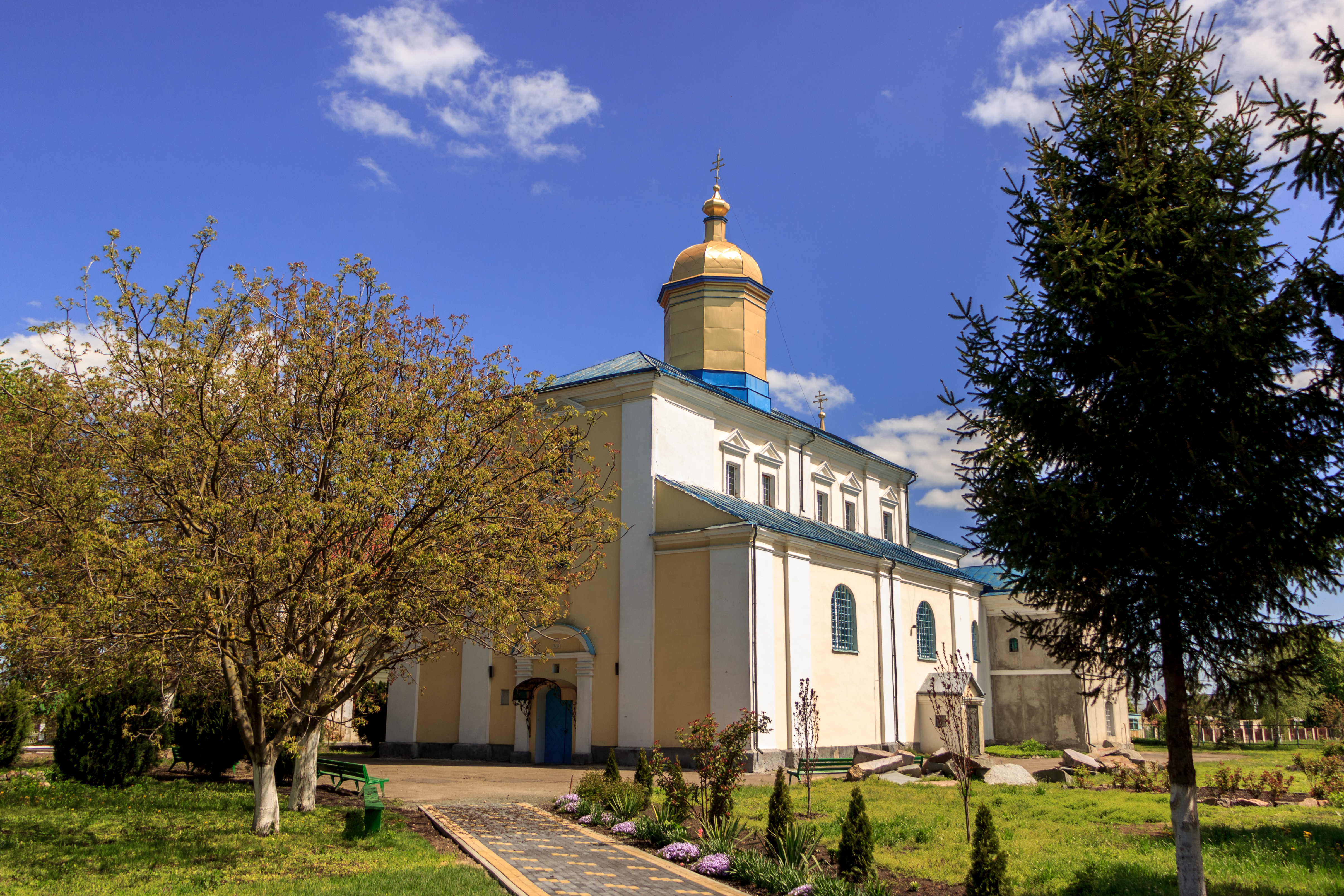 Свято-Миколаївський храм Жидичинського монастиря